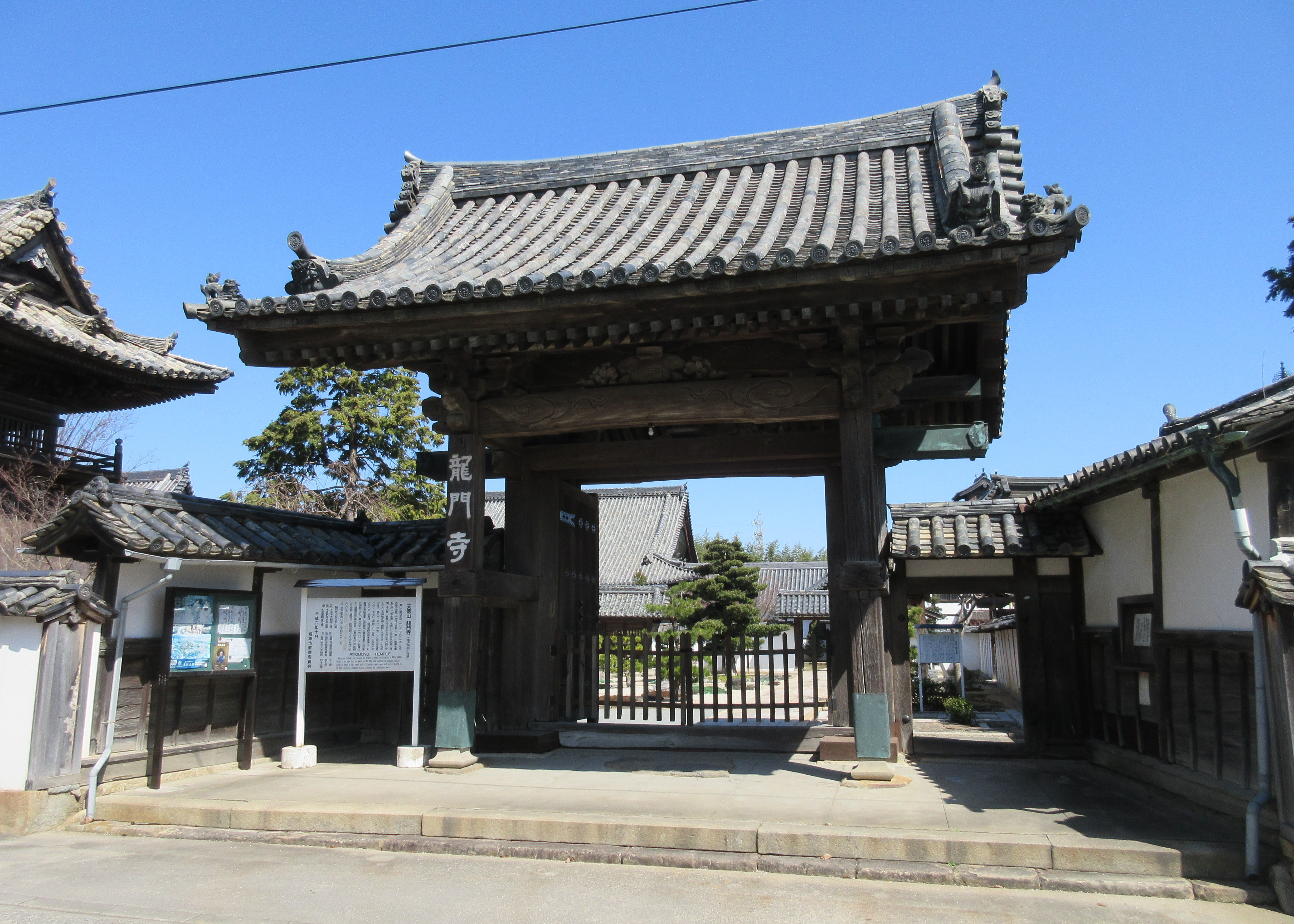 姫路市の龍門寺山門